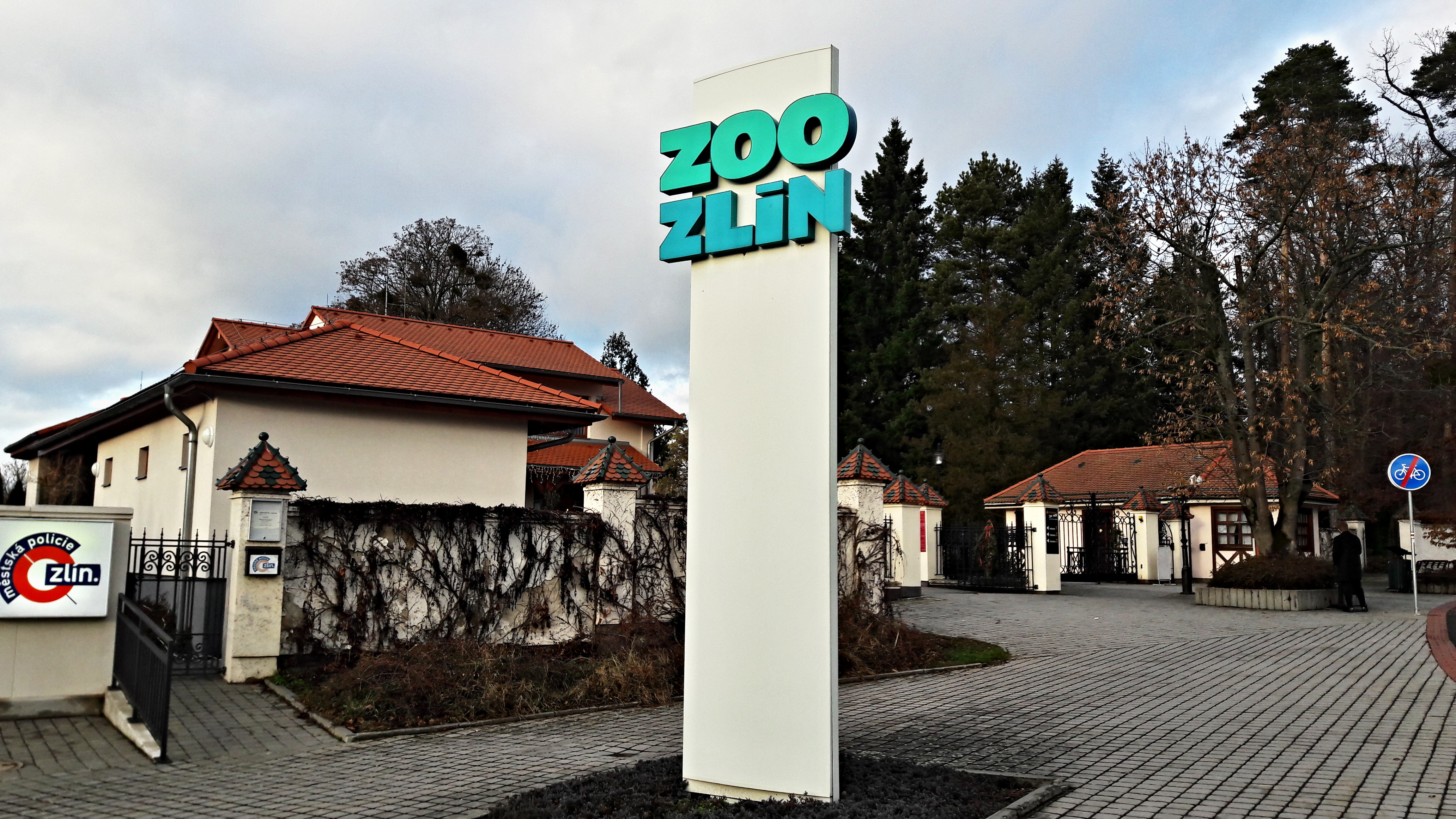 Zlín-Lešná